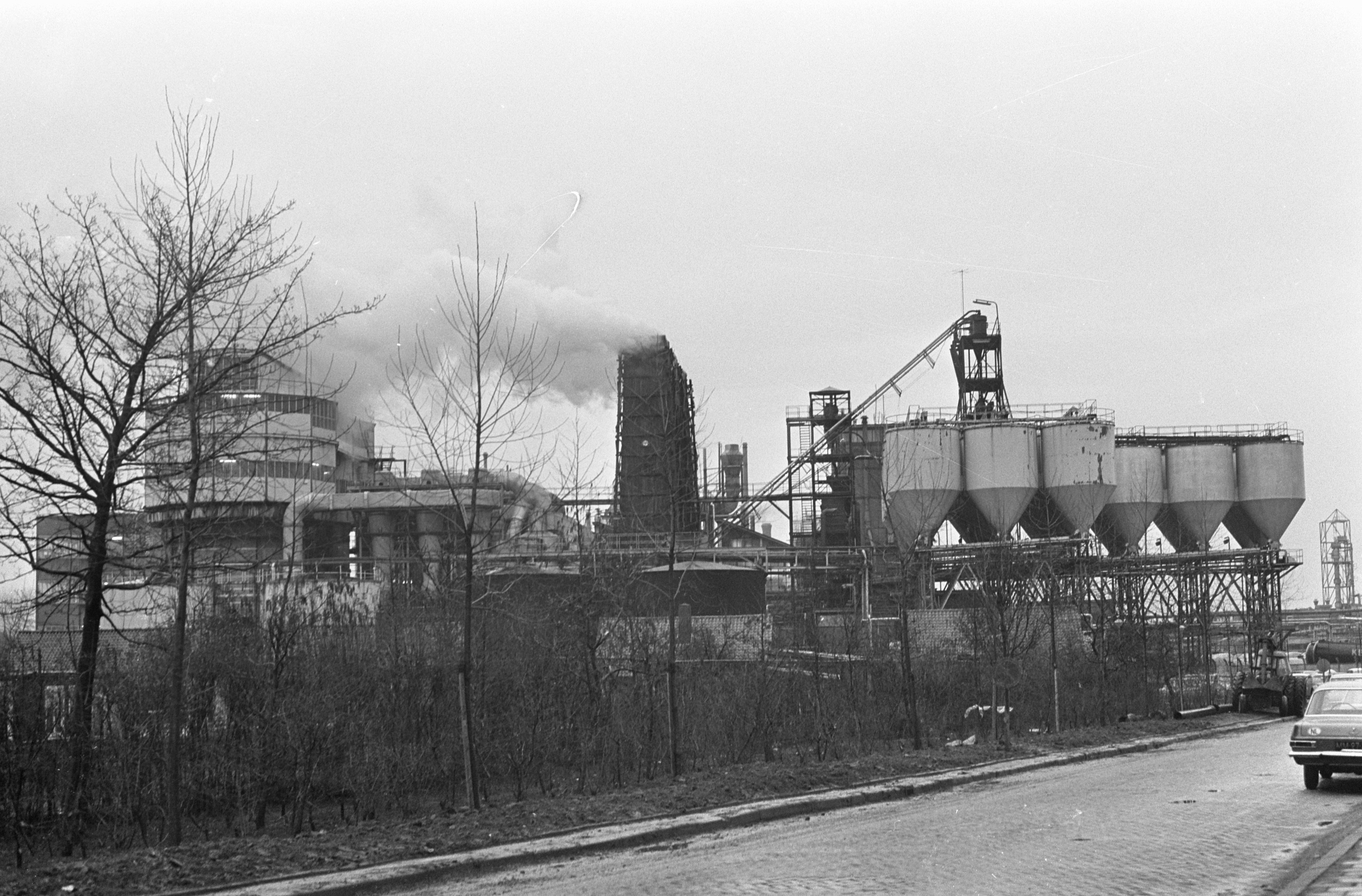 Collectie / Archief : Fotocollectie Anefo Reportage / Serie : [ onbekend ] Beschrijving : Fabriek Ketjen Datum : 17 februari 1967 Locatie : Amsterdam, Noord-Holland Trefwoorden : chemie, fabrieken, industrie Persoonsnaam : Ketjen Fotograaf : Jongerhuis, Pieter / Anefo Auteursrechthebbende : Nationaal Archief Materiaalsoort : Negatief (zwart/wit) Nummer archiefinventaris : bekijk toegang 2.24.01.05 Bestanddeelnummer : 920-0839